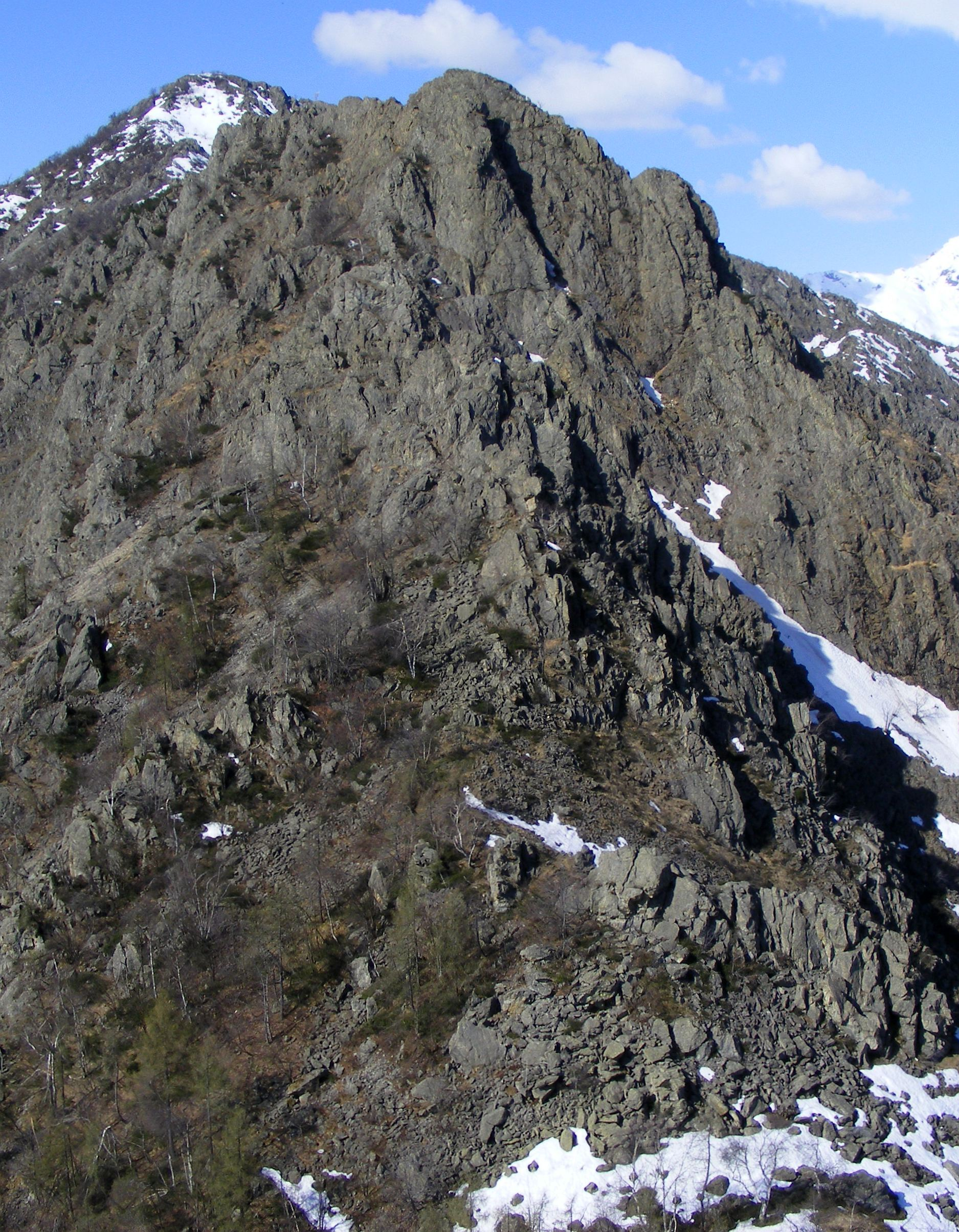 L'Uja di Calcante e le Lunelle dalla Cima Lunelle Unknown